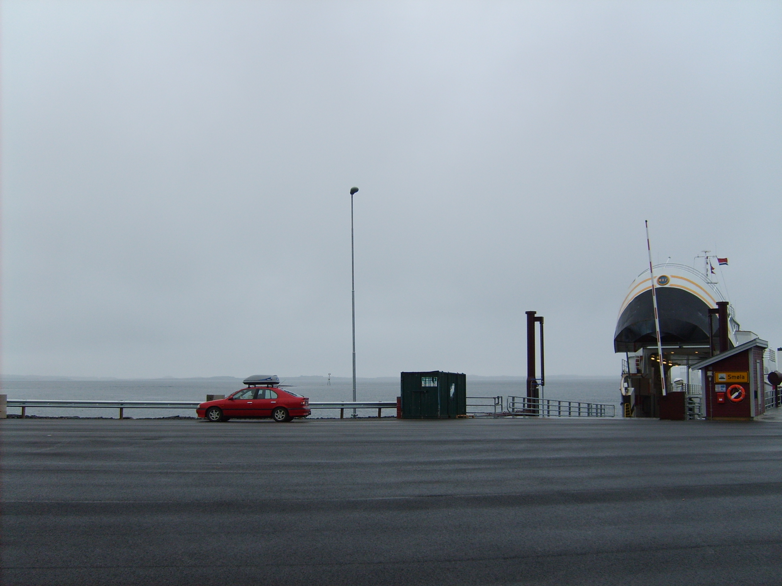 Sandvika ferjekai på Tustna i Aure kommune på Nordmøre. (Foto: Olve Utne)